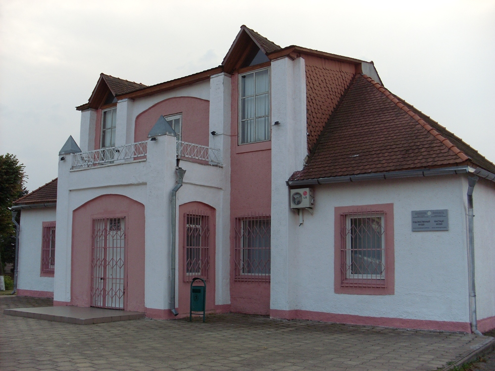 Музей Бялыніцка-Бірулі